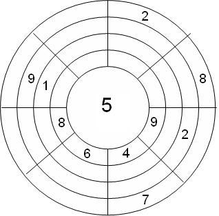 עגולקו - סודוקו עגול